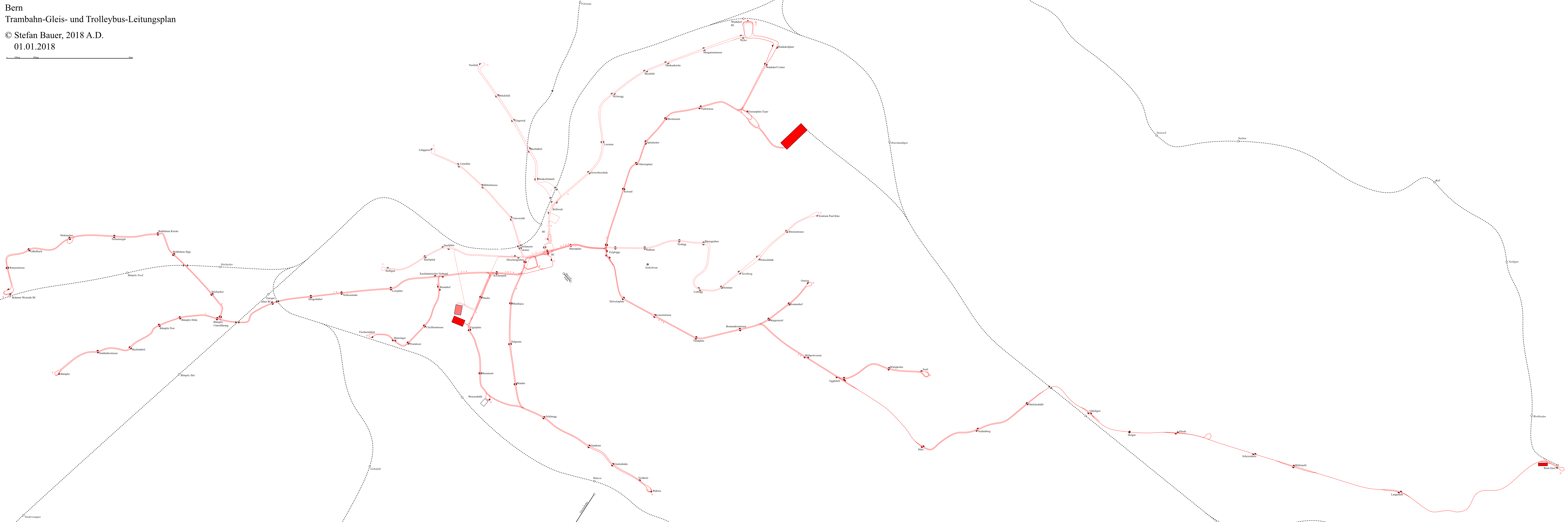 Trambahn-Gleis- und Trolleybus-Leitungsplan Bern 2018